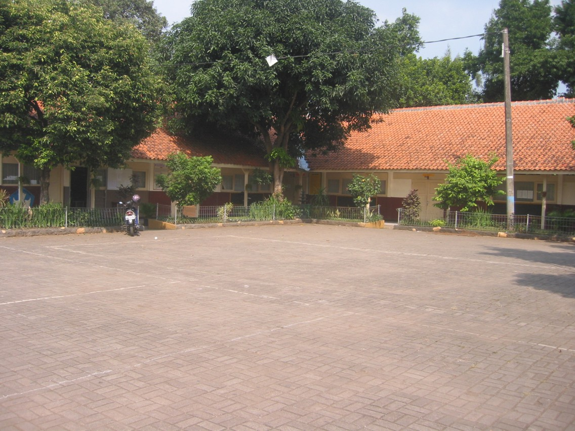 SDN Lebak Bulus 05 Pg